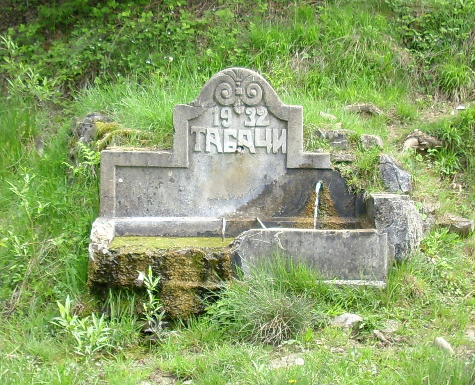 Чешмата в Сечен камък, построена през 1932 г., носи надпис със старото име на селото - Табаци